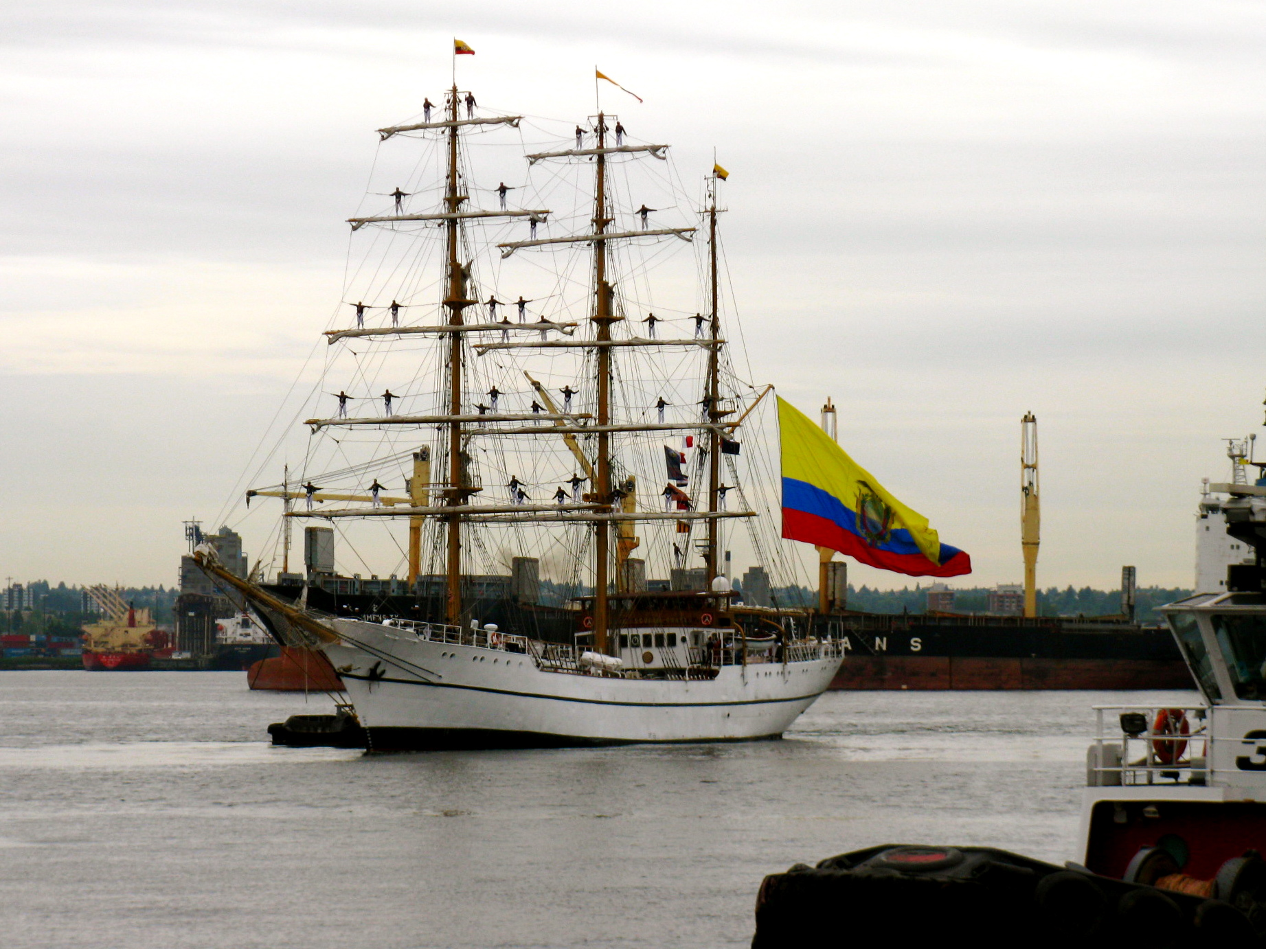 Guayas, das Segelschulschiff der ecuadorianischen Marine, in Schweden